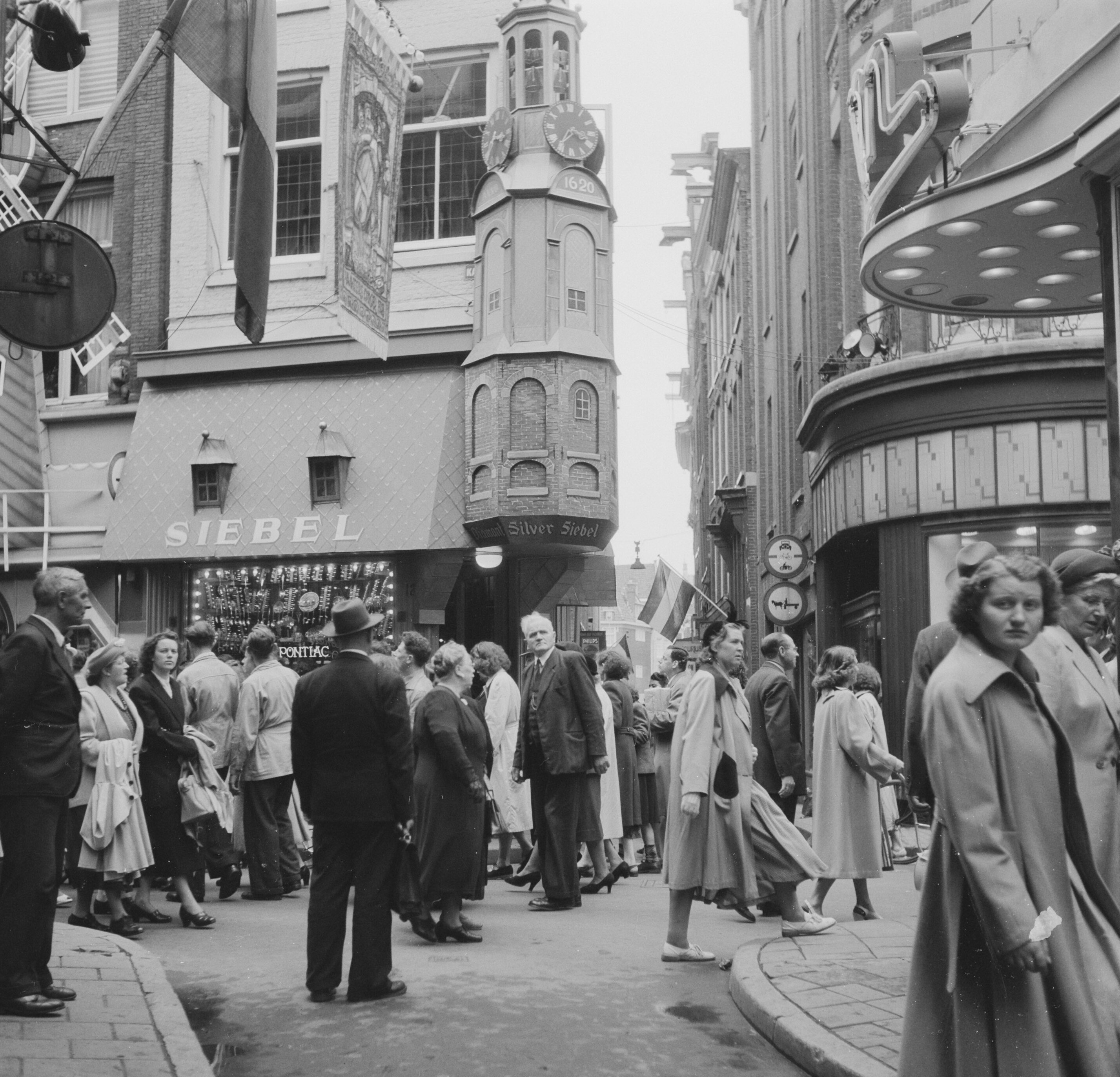 Collectie / Archief : Fotocollectie Anefo Reportage / Serie : [ onbekend ] Beschrijving : Serie publieke belangstelling bij Siebel (onder firma Kinsbergen ) Datum : 28 juni 1950 Trefwoorden : SERIEs, belangstelling Persoonsnaam : Siebe Fotograaf : Noske, J.D. / Anefo Auteursrechthebbende : Nationaal Archief Materiaalsoort : Negatief (zwart/wit) Nummer archiefinventaris : bekijk toegang 2.24.01.03 Bestanddeelnummer : 904-0498 Reacties Geplaatst door Amsterdammertje op 09 september 2016 - 23:26. Viering 500 jaar Kalverstraat. Bij Siebel juwelier is aan de gevel een miniatuur Munttoren gebouwd. Persoon in Oud-Hollandse kleding maakt reclame voor horloges. Plaats: Amsterdam, Noord-Holland NB. de firma A. Kinsbergen NV. was een importeur van diverse merken horloges en gevestigd aan het Oosteinde 9 te Amsterdam zie ook: en